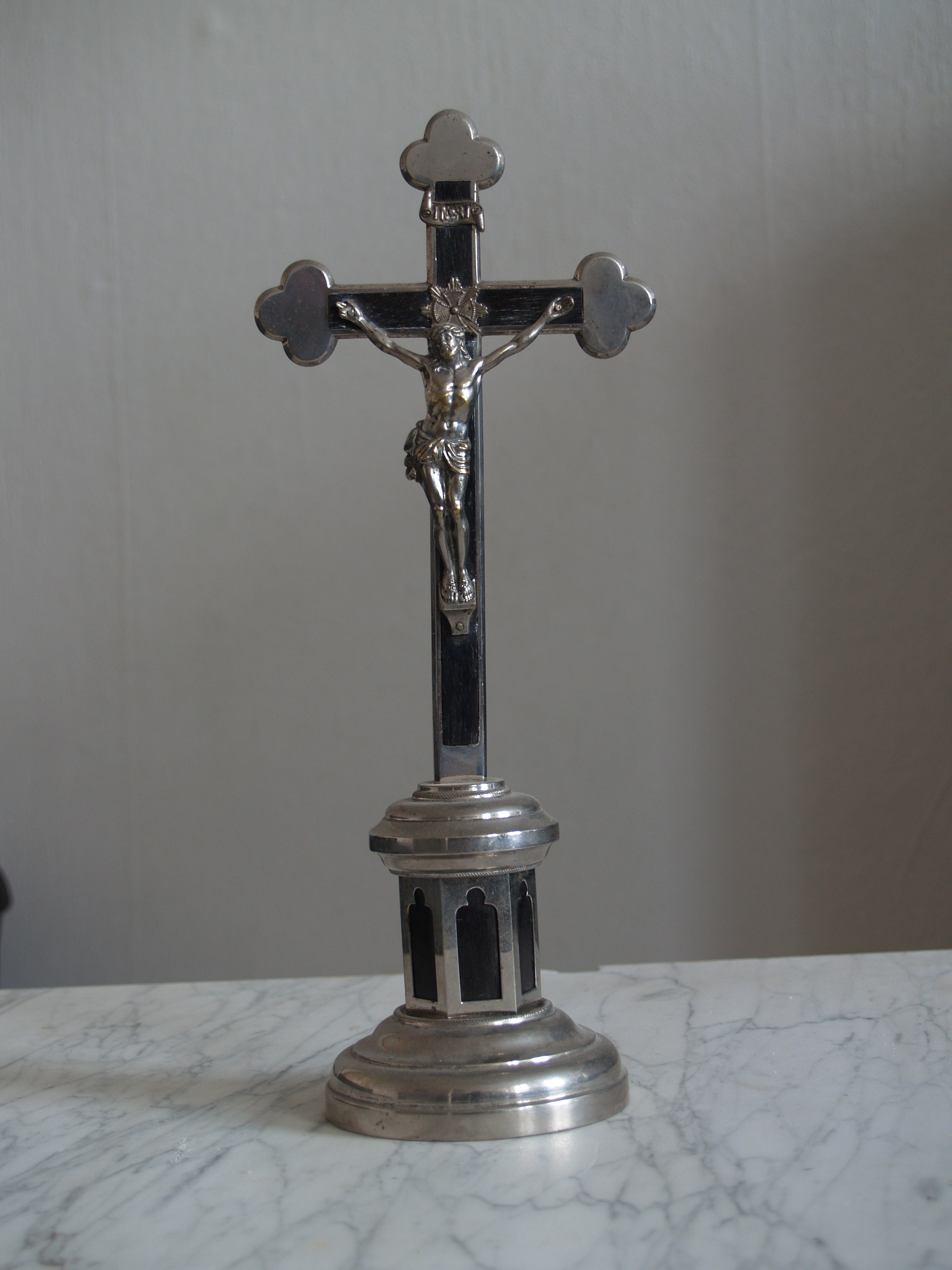 Sterbekreuz aus dem 19. Jahrhundert